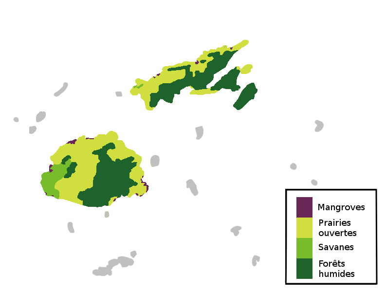 Carte des différents biomes présents sur les principales îles des Fiji. Travail dérivé de cette carte